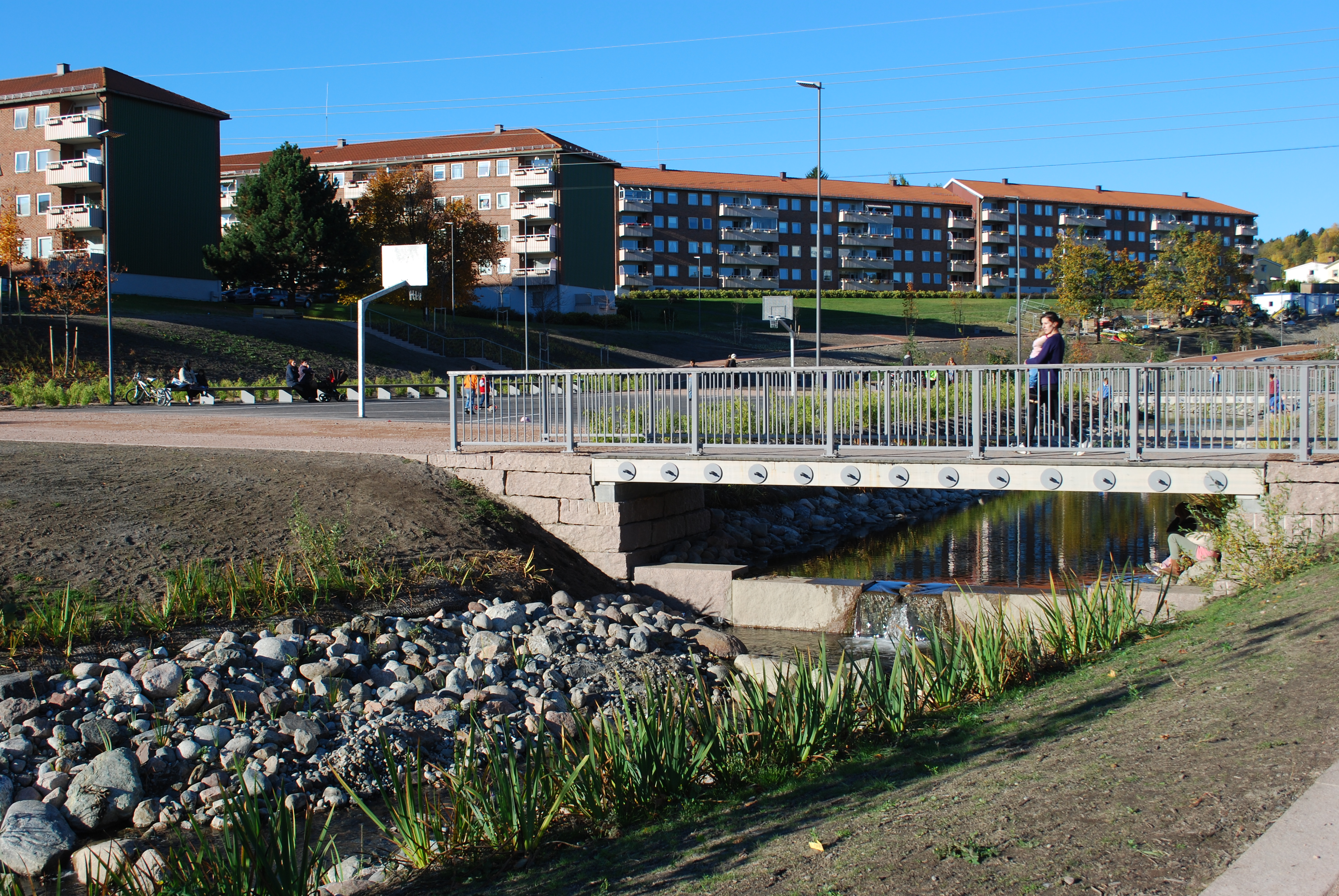 Bjerkedalen park, Økernbråten, Oslo, nyåpnet 2013, med bro